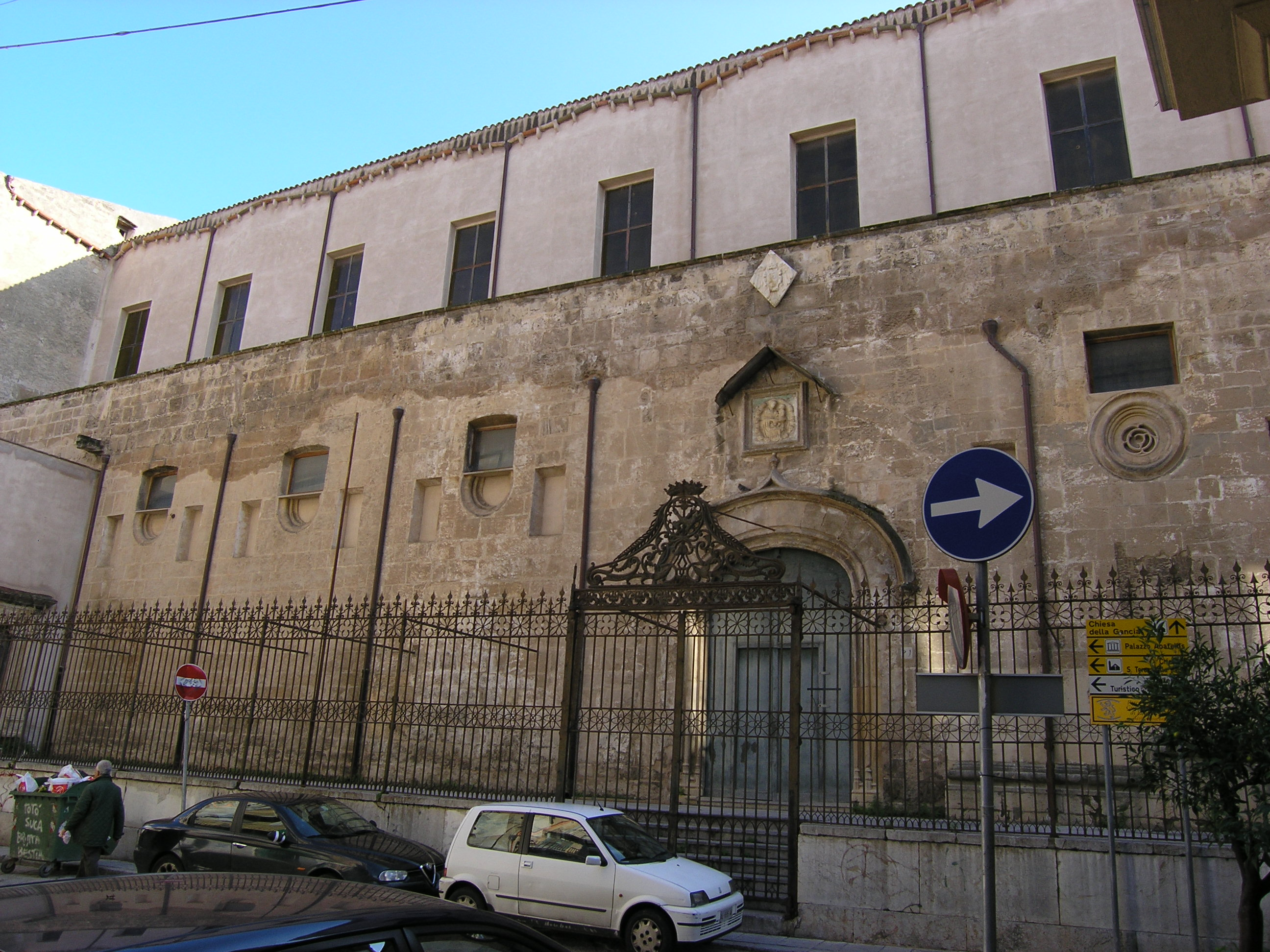 Sicilianu: Cummentu di la Gancia